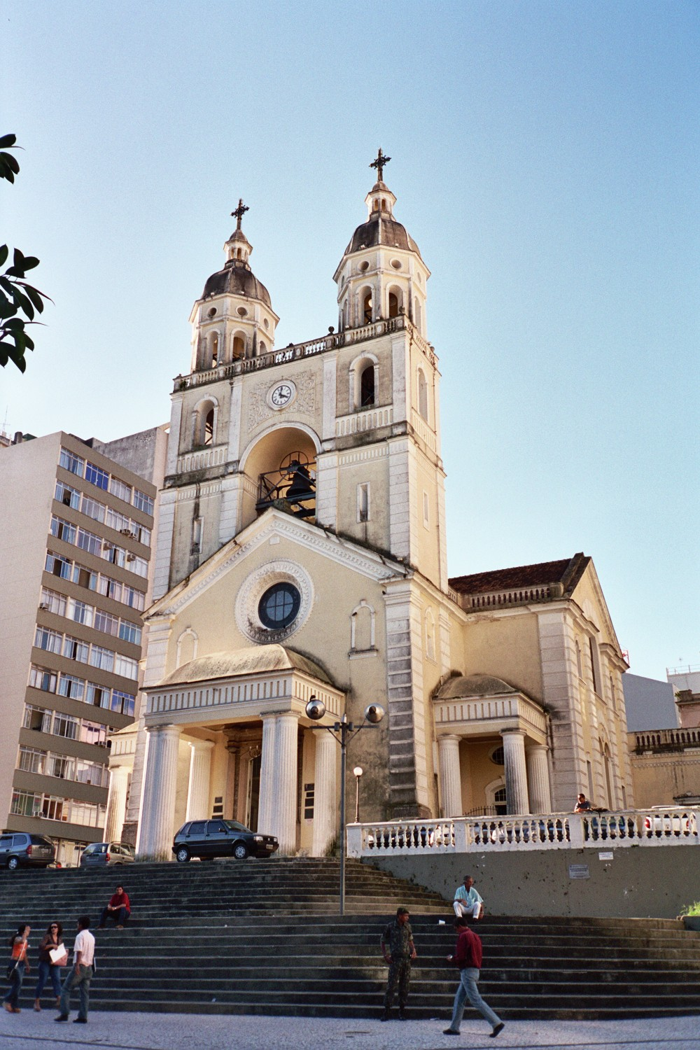 Vue de la cathédrale de Florianópolis depuis la place XV de Novembro, Florianópolis, Brésil